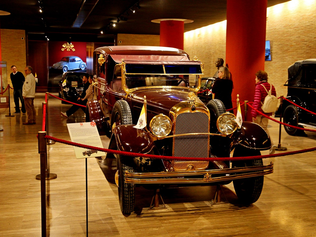 Citroën AC6 Lictoria Sex von 1930 als Papamobil für Papst Pius XI.